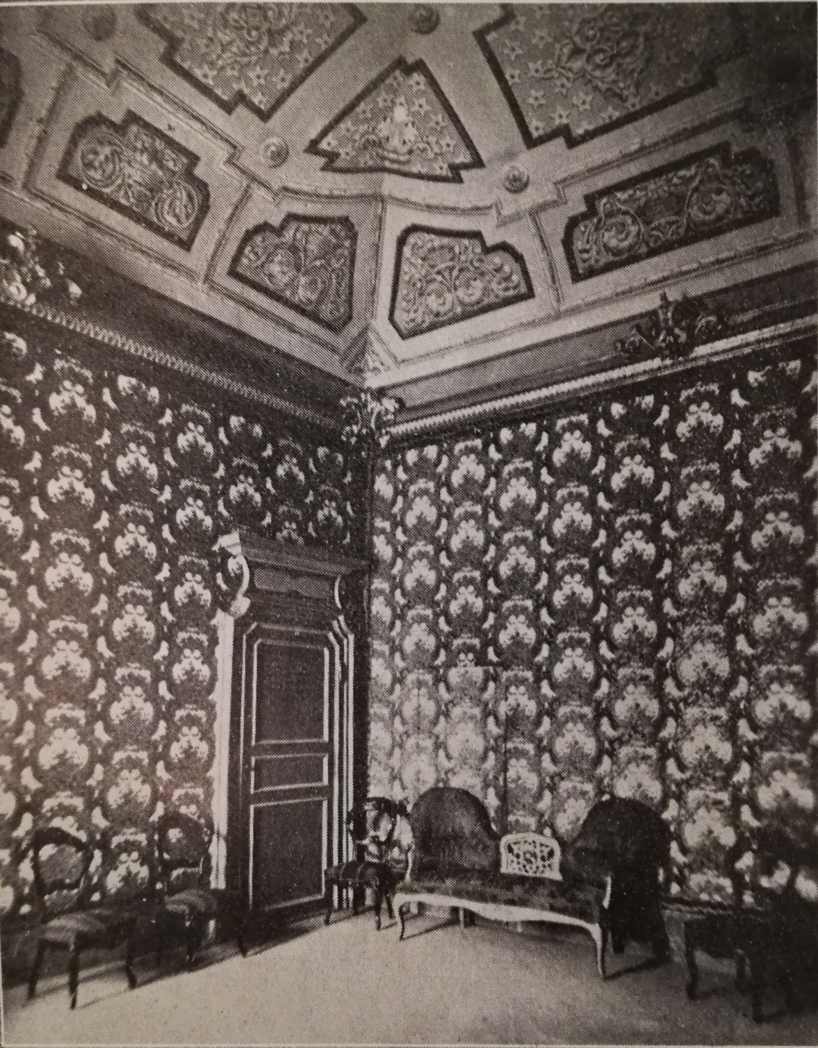 la sala dove dormì Vittorio Amedeo II